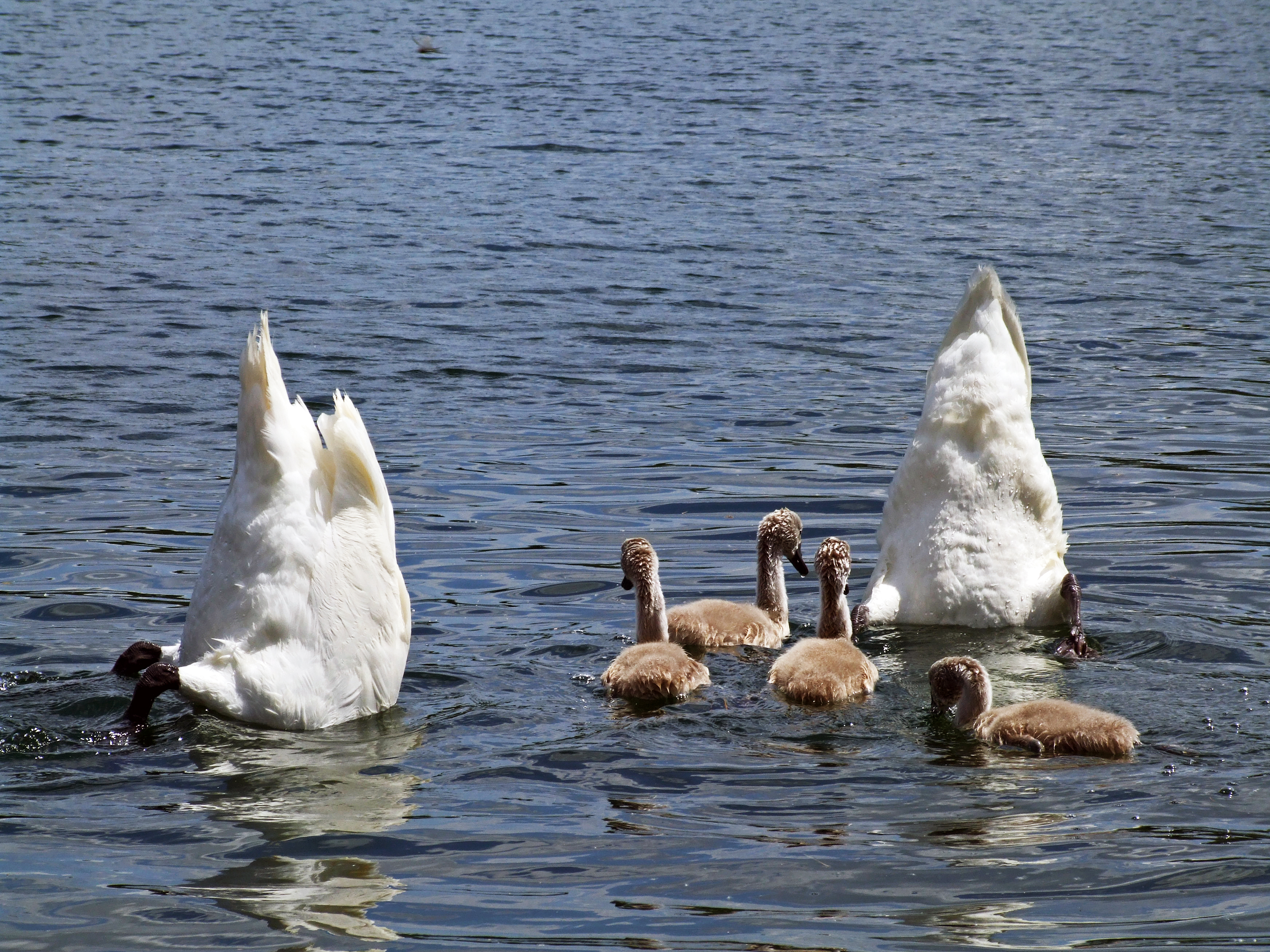 Schwanenpaar beim Gründeln mit Jungen im Sonnensee, Binsfeld, Speyer, Deutschland